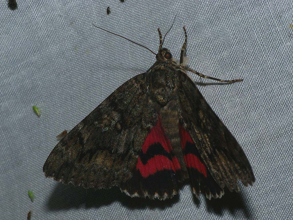 Exemplar found: Russia, Moscow Oblast, Serebryano-Prudsky District, near village Lishnyagi, 08.08.2012, by light МО, Серебряно-Прудский р-н, окрестности деревни Лишняги, 08.08.2012, на свет